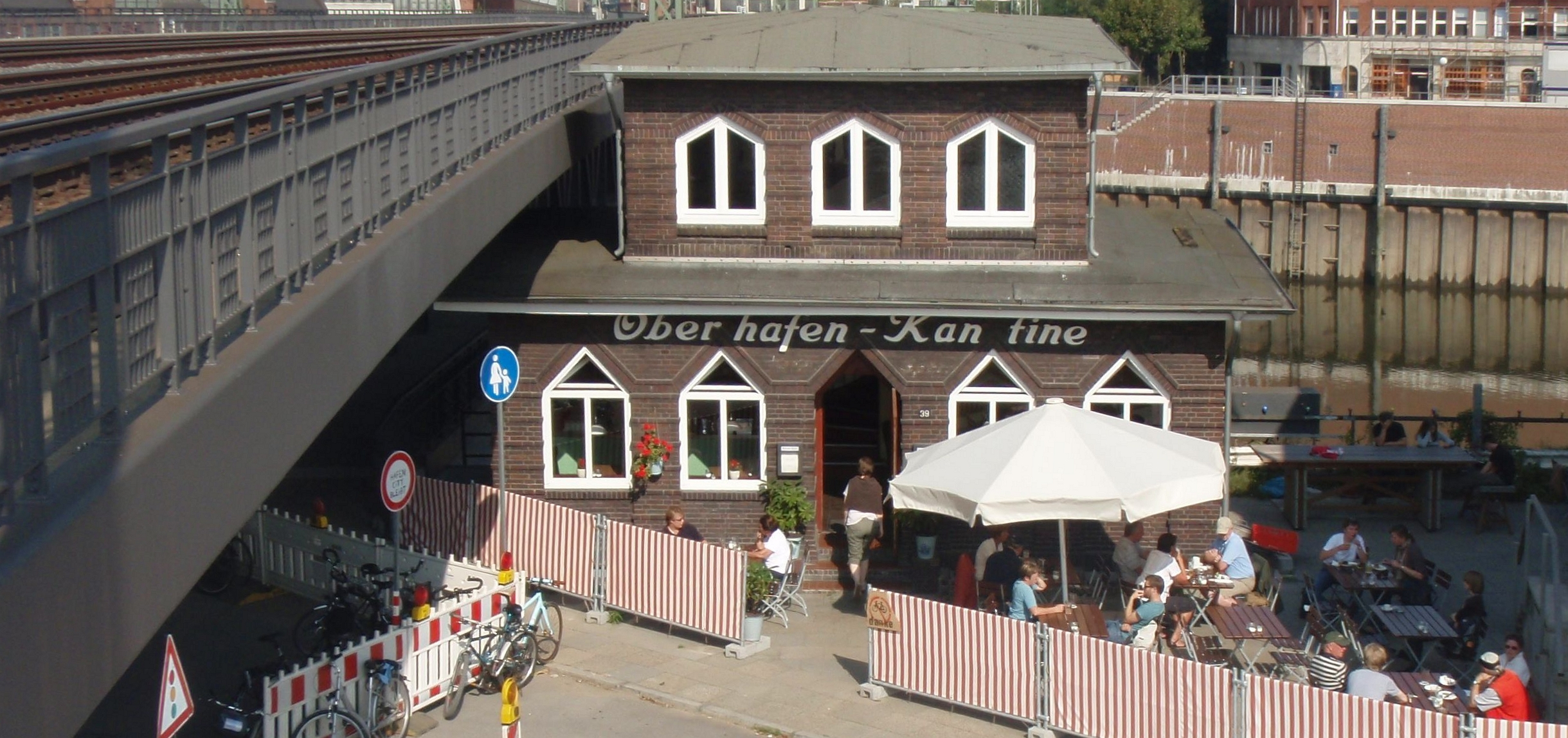 Oberhafenkantine Stockmeyerstraße 43 20. September 2009